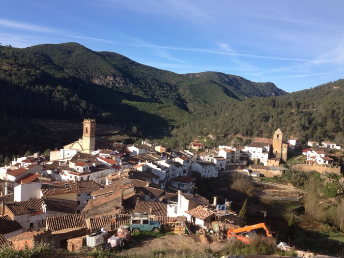 Vista de Lludient